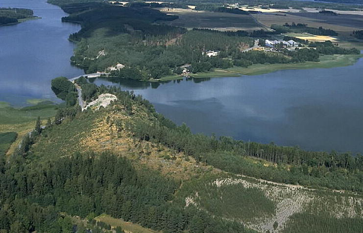 Vägen mot Häggeby (bildens övre del Häggeby sn). Motiv: Varpsund Nyckelord: Flygbilder, Riksintressen Kategori: InsjömiljöerVägen mot Häggeby (bildens övre del Häggeby sn).